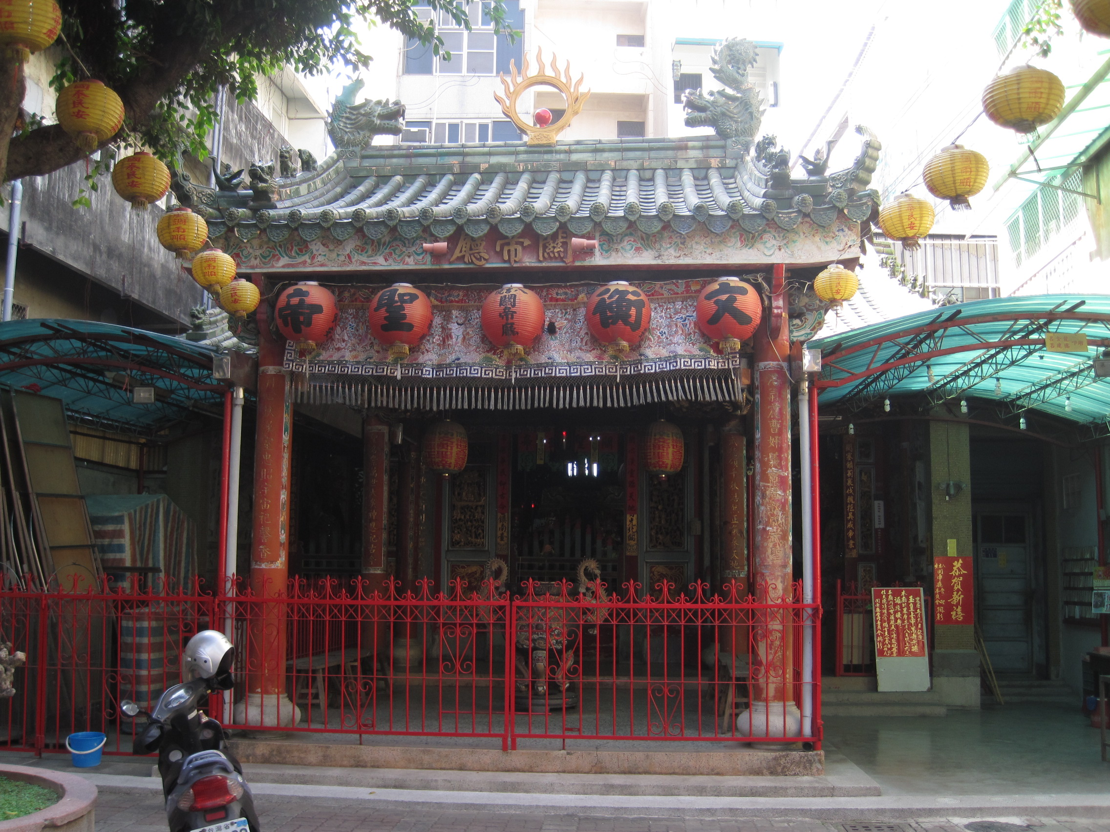 臺南八吉境關帝廳